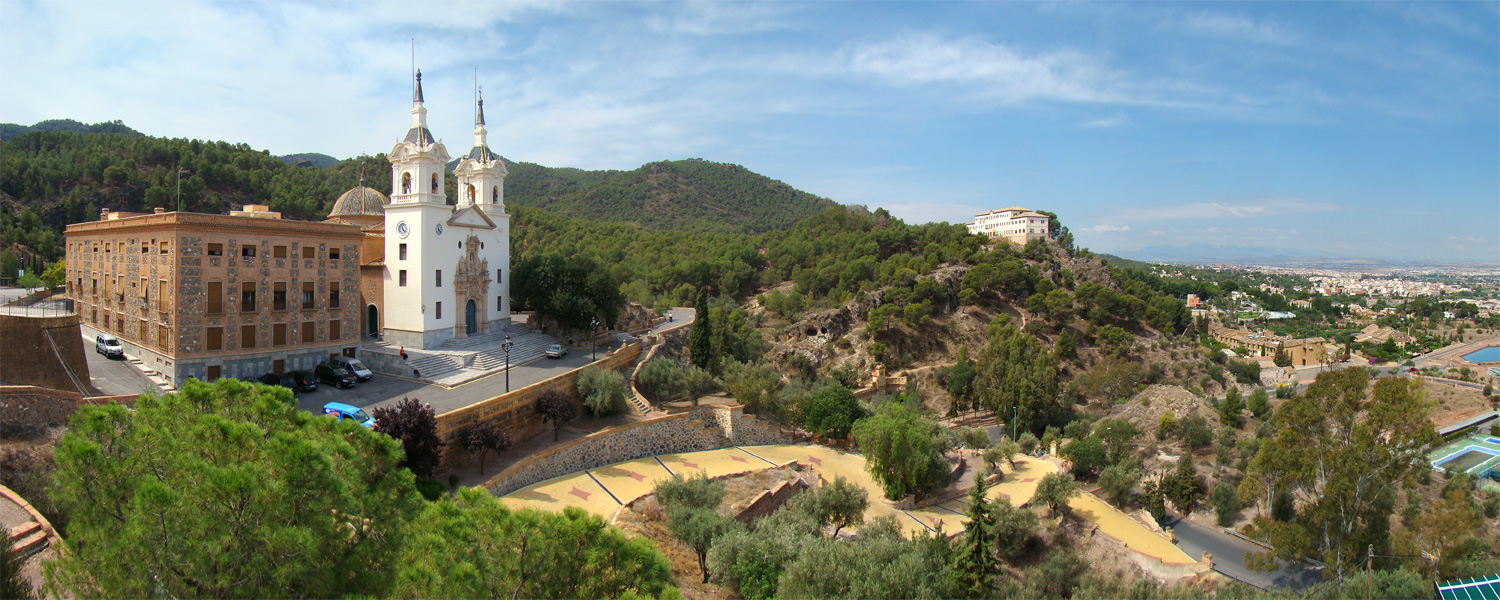 Santuario de la Fuensanta, Murcia, Región de Murcia, España.